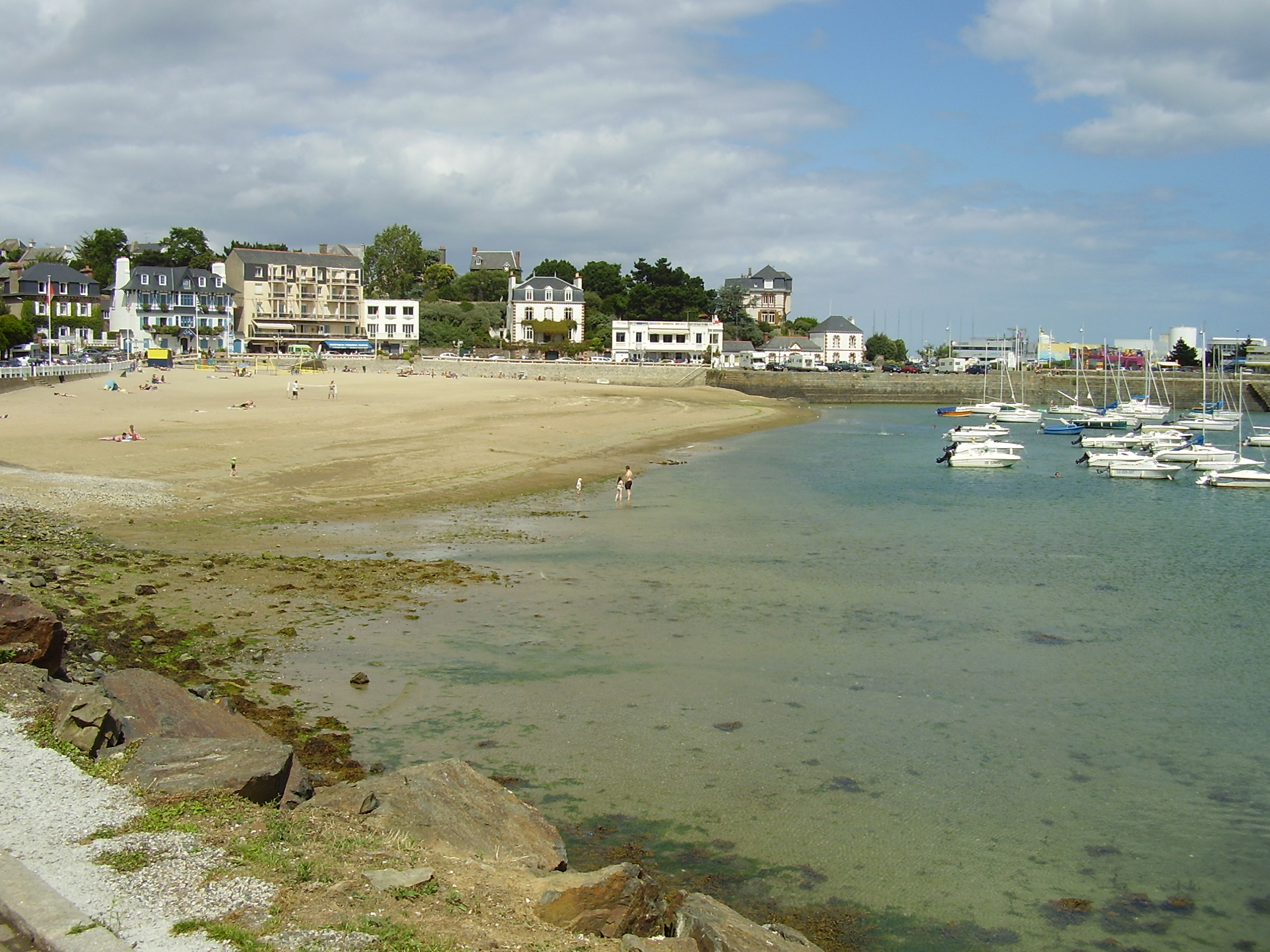 Saint-Quay-Portrieux, France. La plage du port.